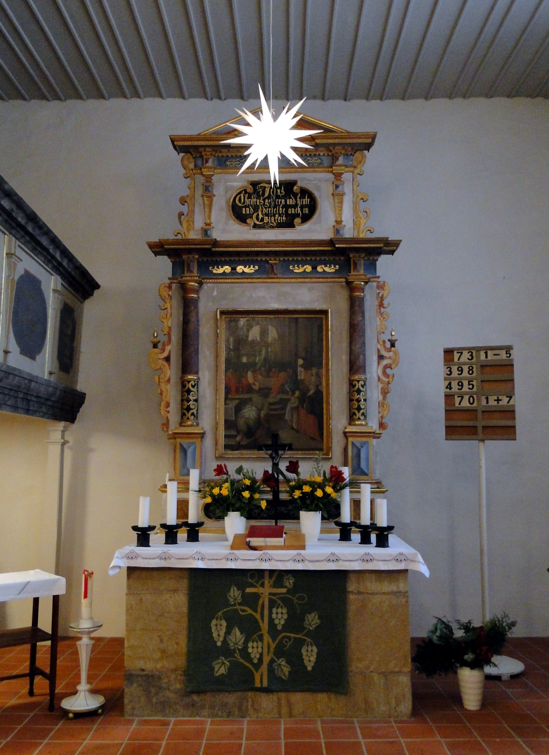 Christophoruskirche Dresden-Wilschdorf